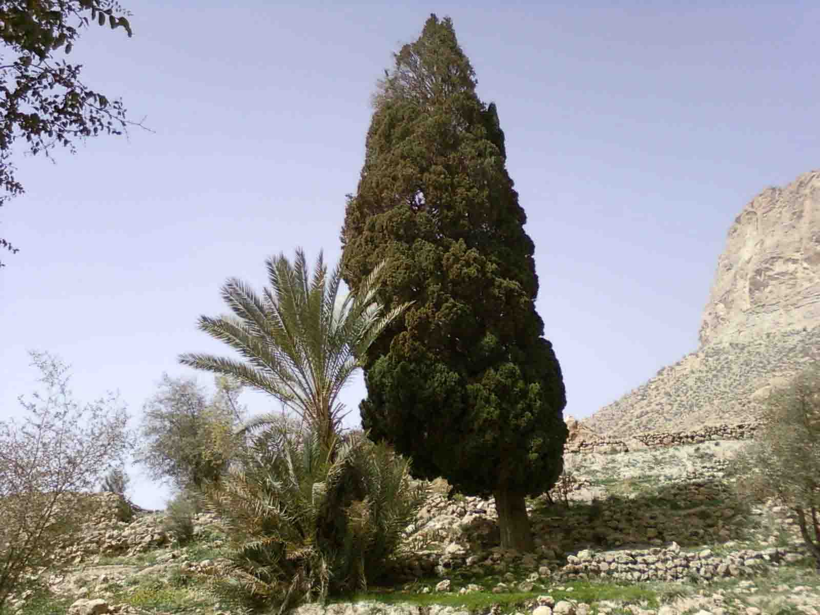 منطقه تفریحی رحمت آباد جویم، سرو رحمت آباد